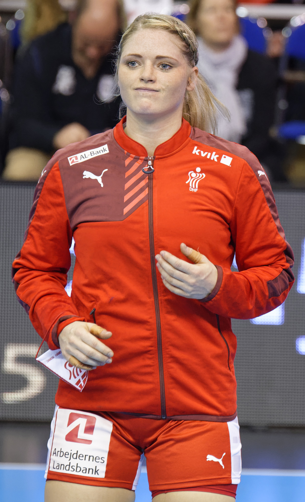 Rencontre France - Danemark lors de la Golden League. A Dijon, le 19 mars 2015.